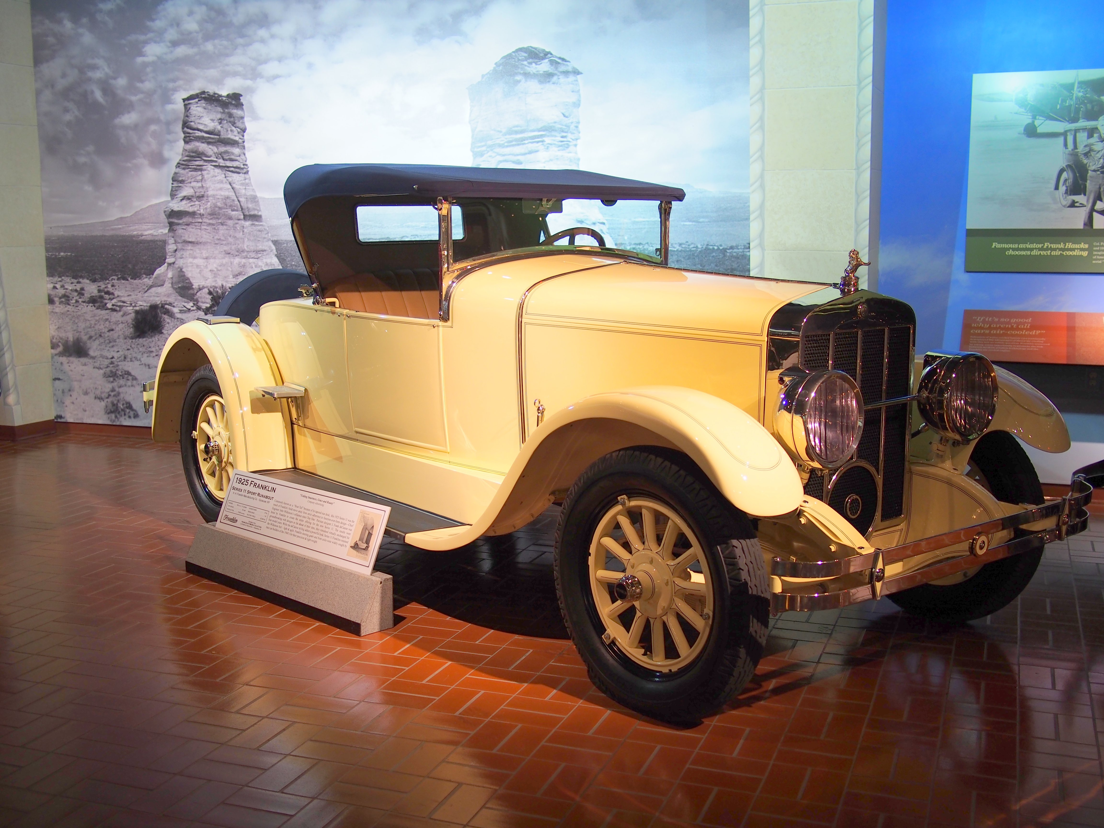 1925 Franklin Series 11 Sport Runabout